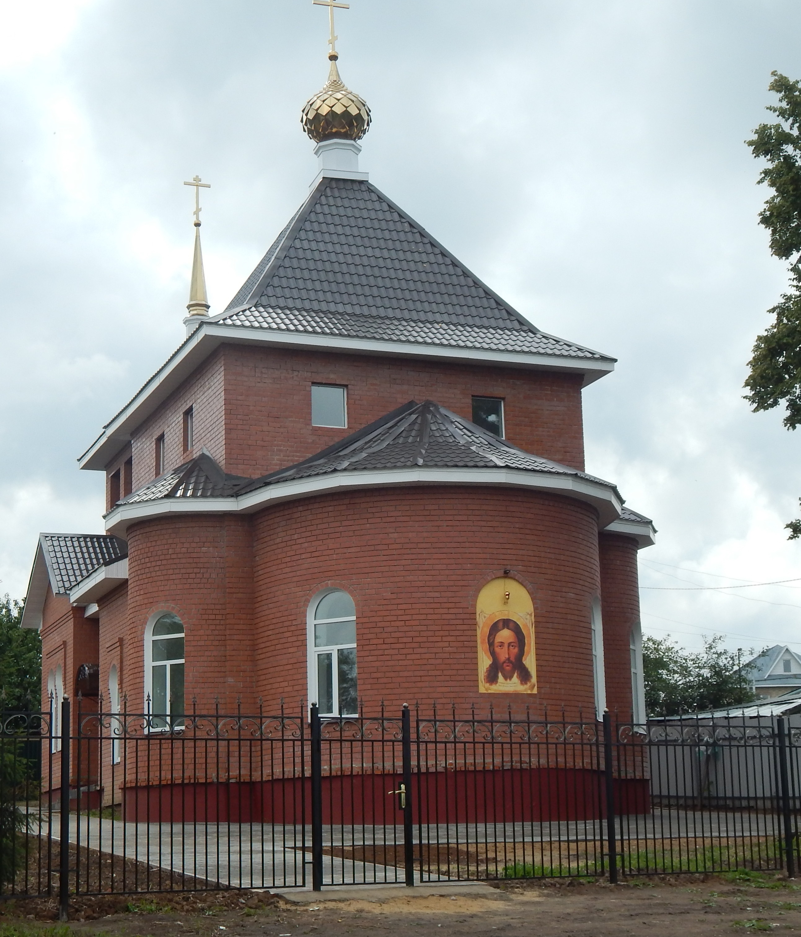 Успенская церковь г Струнино